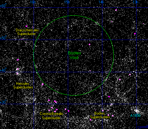 Il Vuoto del Boöte